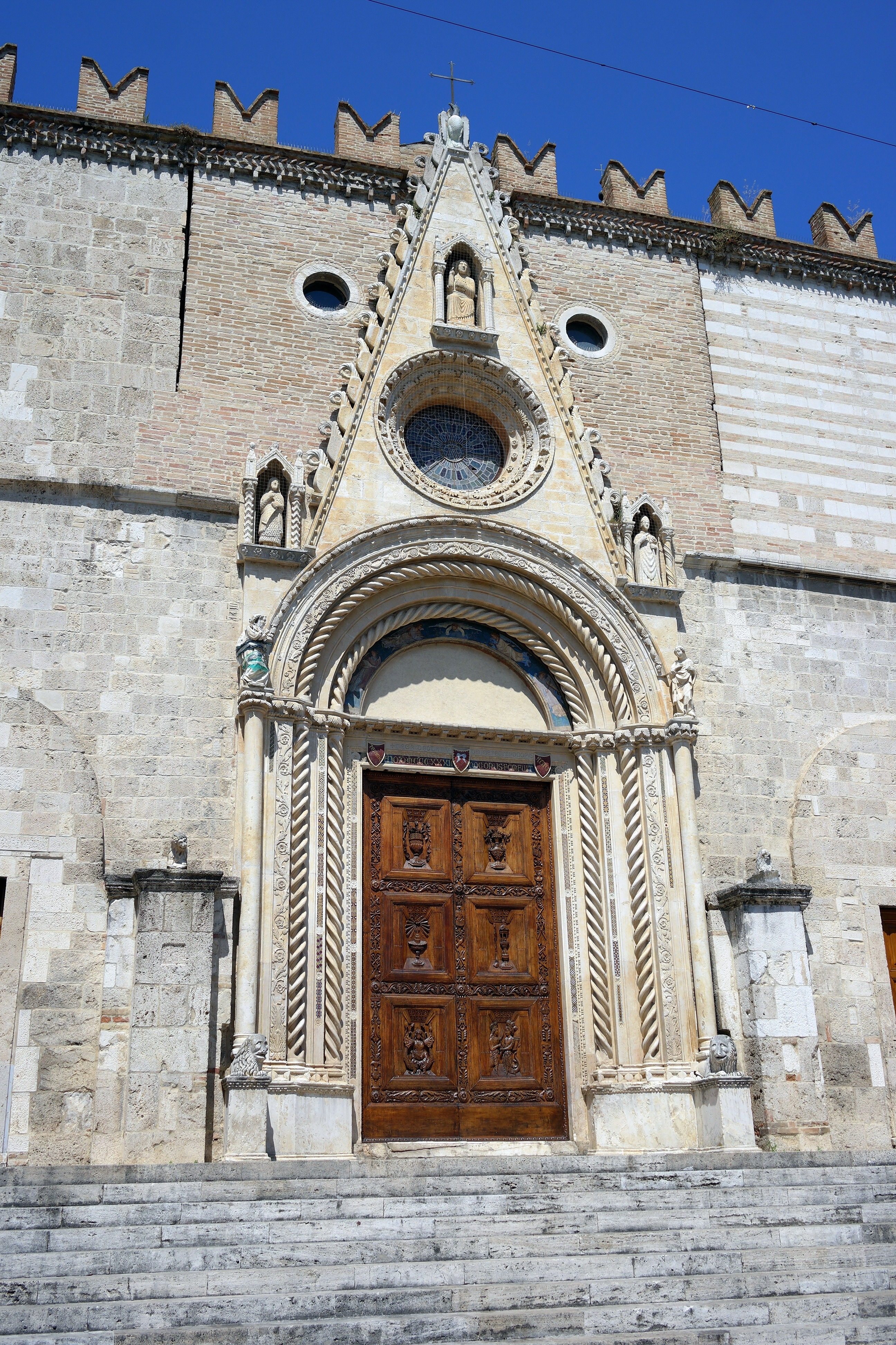 Esterno del Duomo di Teramo, dettaglio del portale